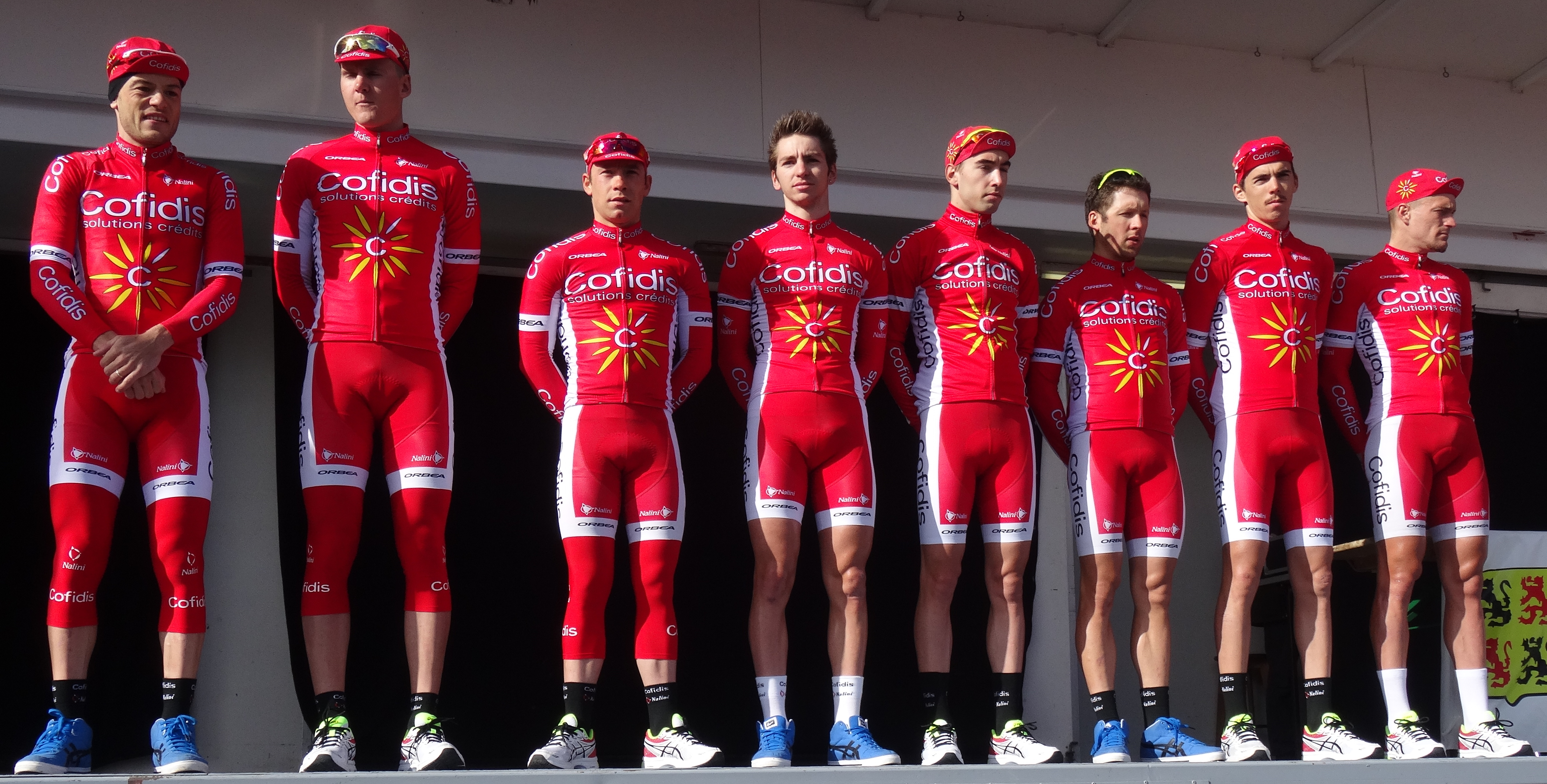 Reportage réalisé le mercredi 4 mars à l'occasion du départ du Samyn des Dames 2015 et du Samyn 2015 à Quaregnon, Belgique.